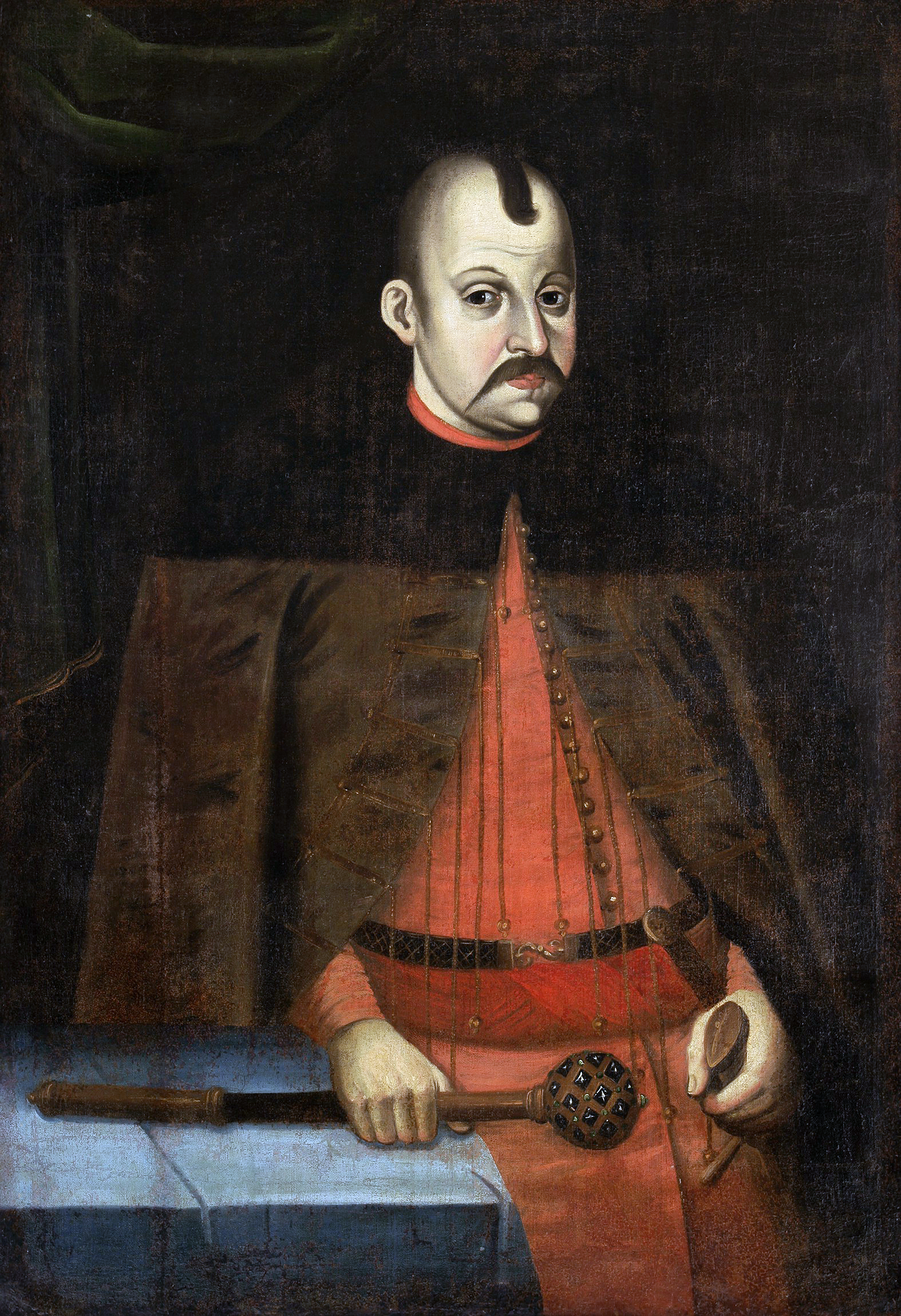 Беларуская (тарашкевіца): Партрэт Альбрэхта Ўладзіслава Радзівіла (Albrecht Uładzisłaŭ Radzivił).